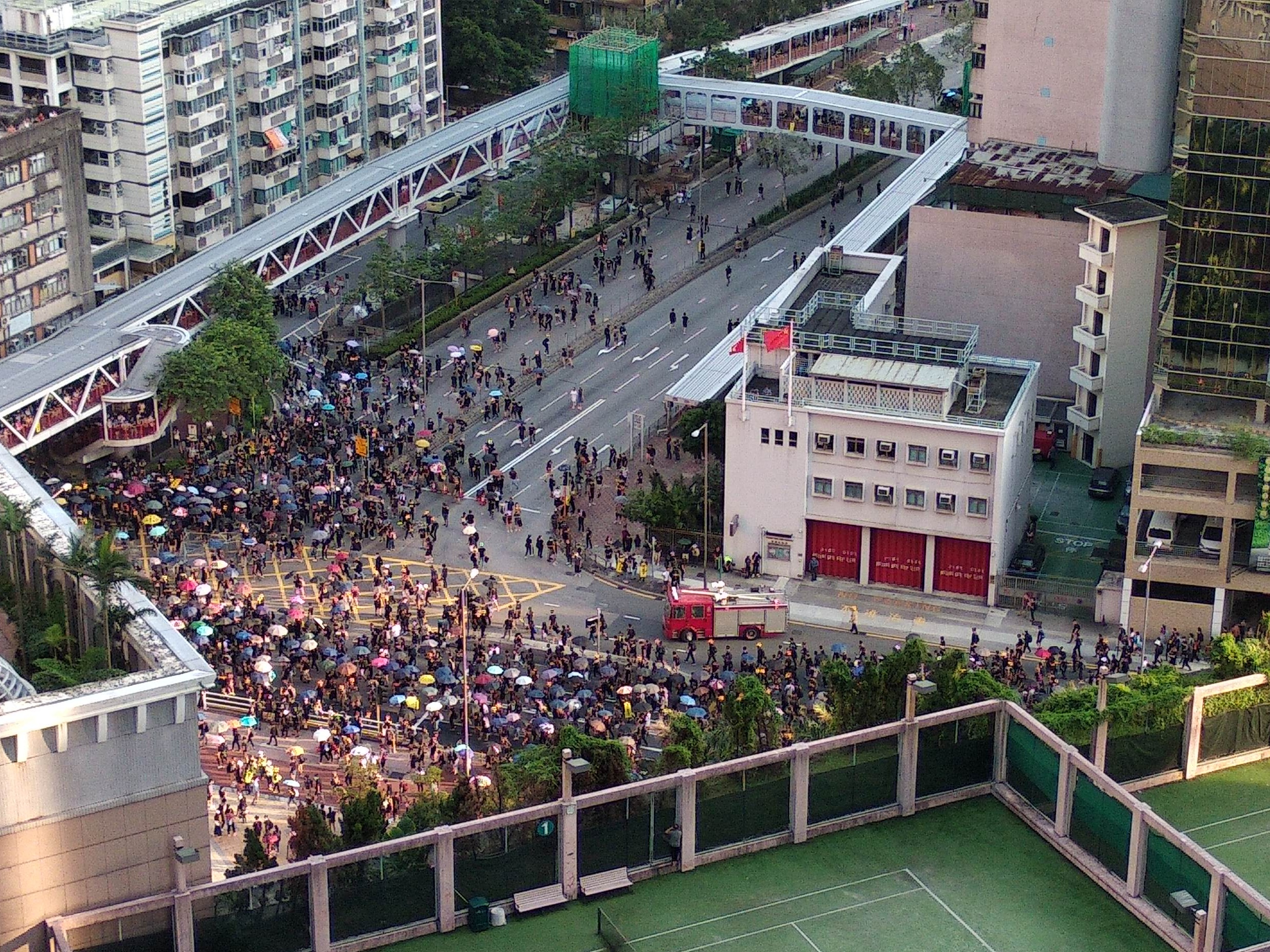 中文（香港）: 佔據荃灣青山公路和大涌道路面的示威者正往新界南警區總部方向撤退，同時讓路予消防車通過。